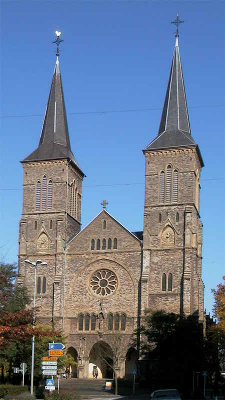 Diddelenger Parkierch St. Martin